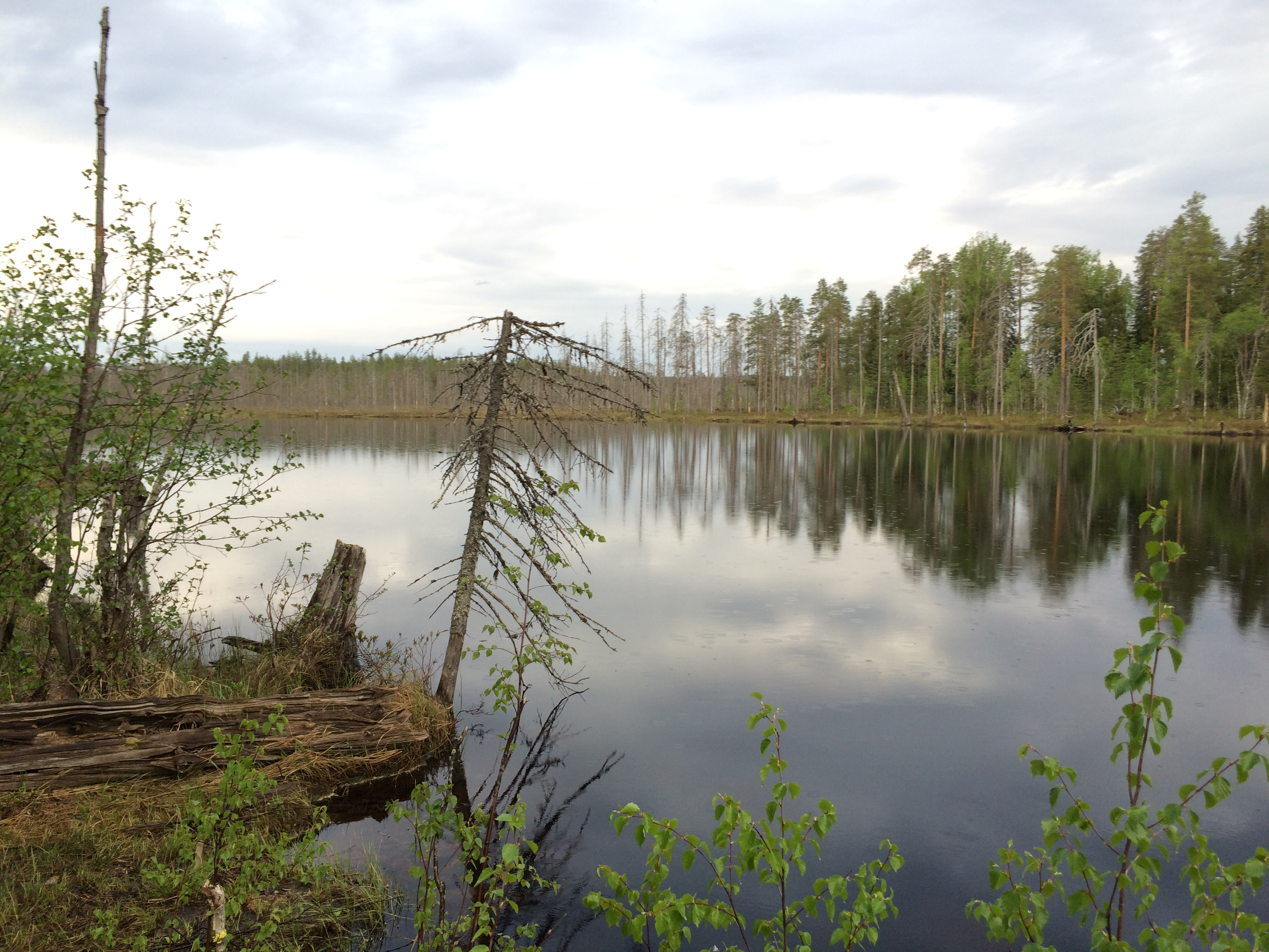 Верхний Термант